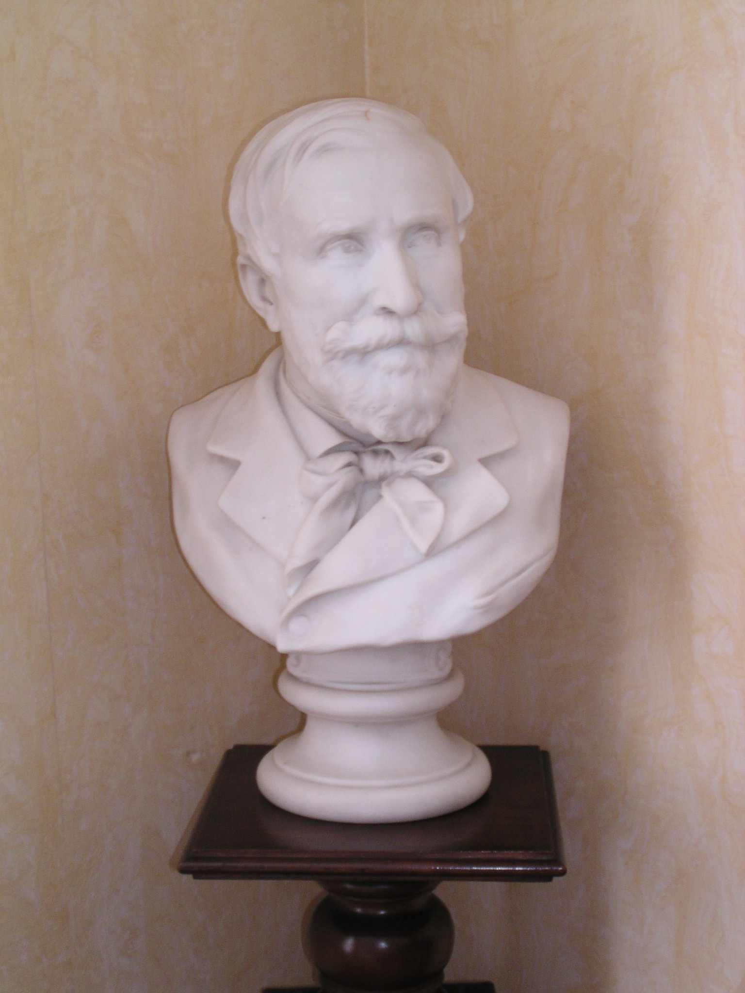 Buste de Charles Coran, propriété de ses descendants directs